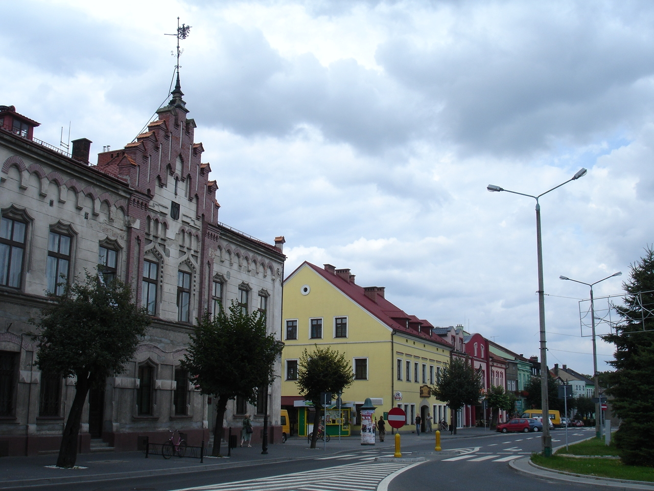 village Zator - main market